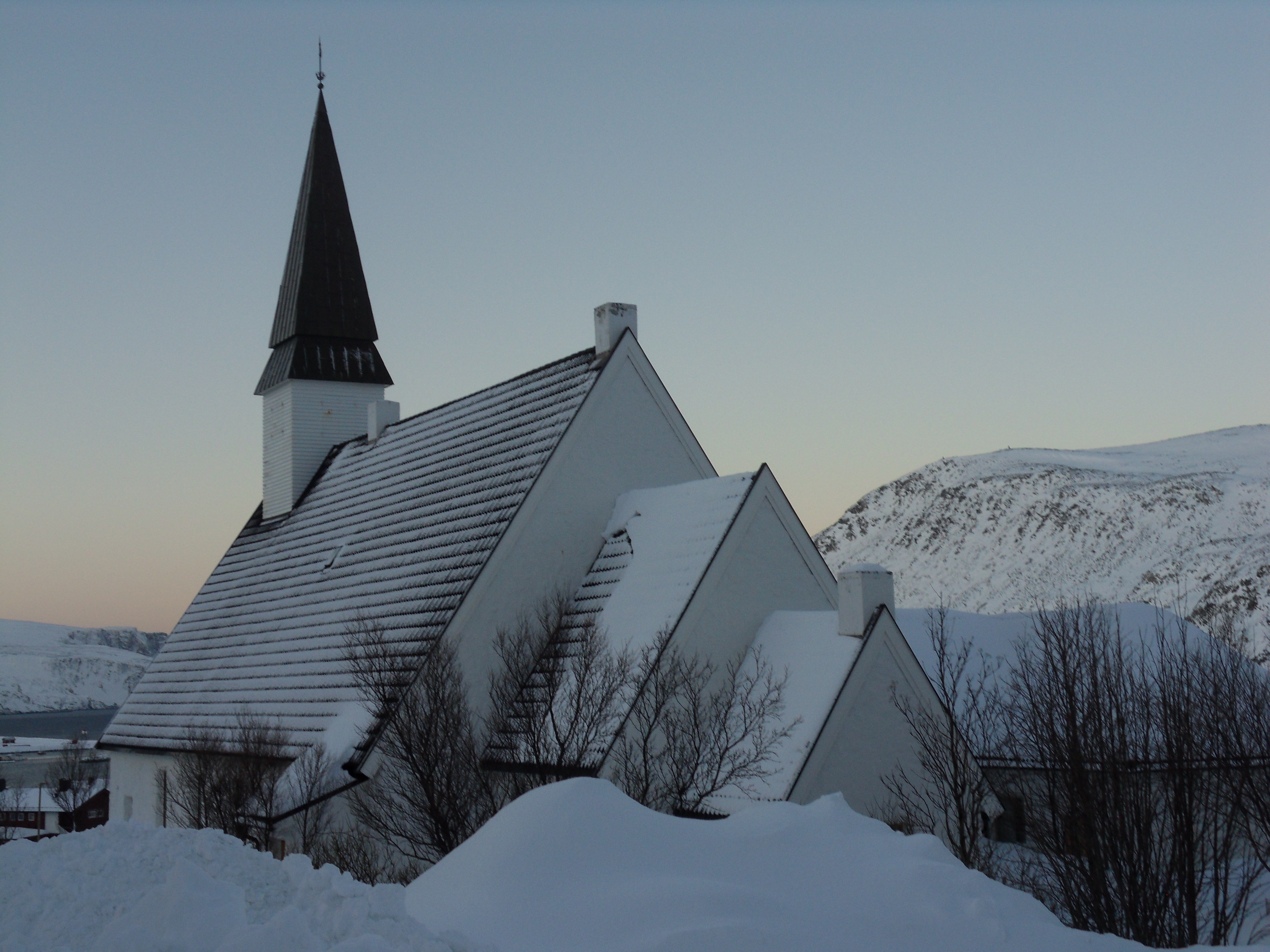 Kjøllefjord kirke er en langkirke fra 1951 i Lebesby kommune, Finnmark fylke. Den er bygget i stein og har 300 plasser.